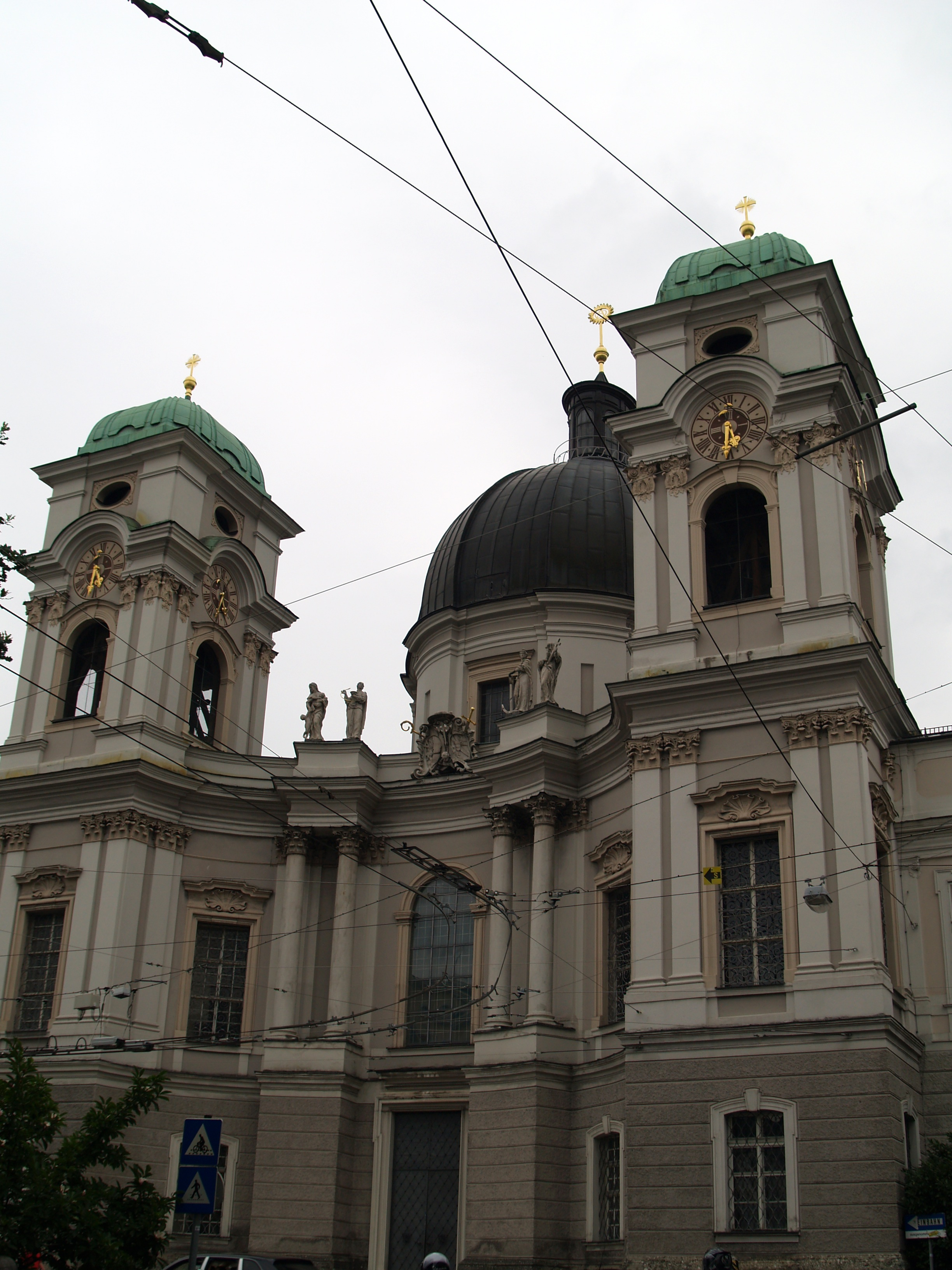 Salzburgo. Iglesia de la Santísima Trinidad. Johann Bernhard Fischer von Erlach.